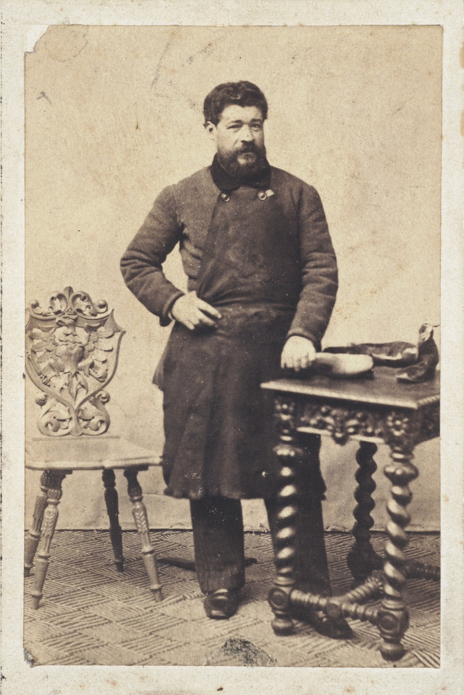 Stanisław Eugeniusz Hiszpański (1815–1890)- fotografia Karola Beyera, [post 27 02 1861]